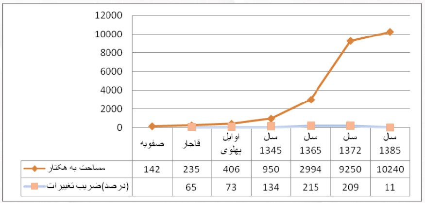 روند افزایش سطح کالبدی شهر رشت تا سال 1385